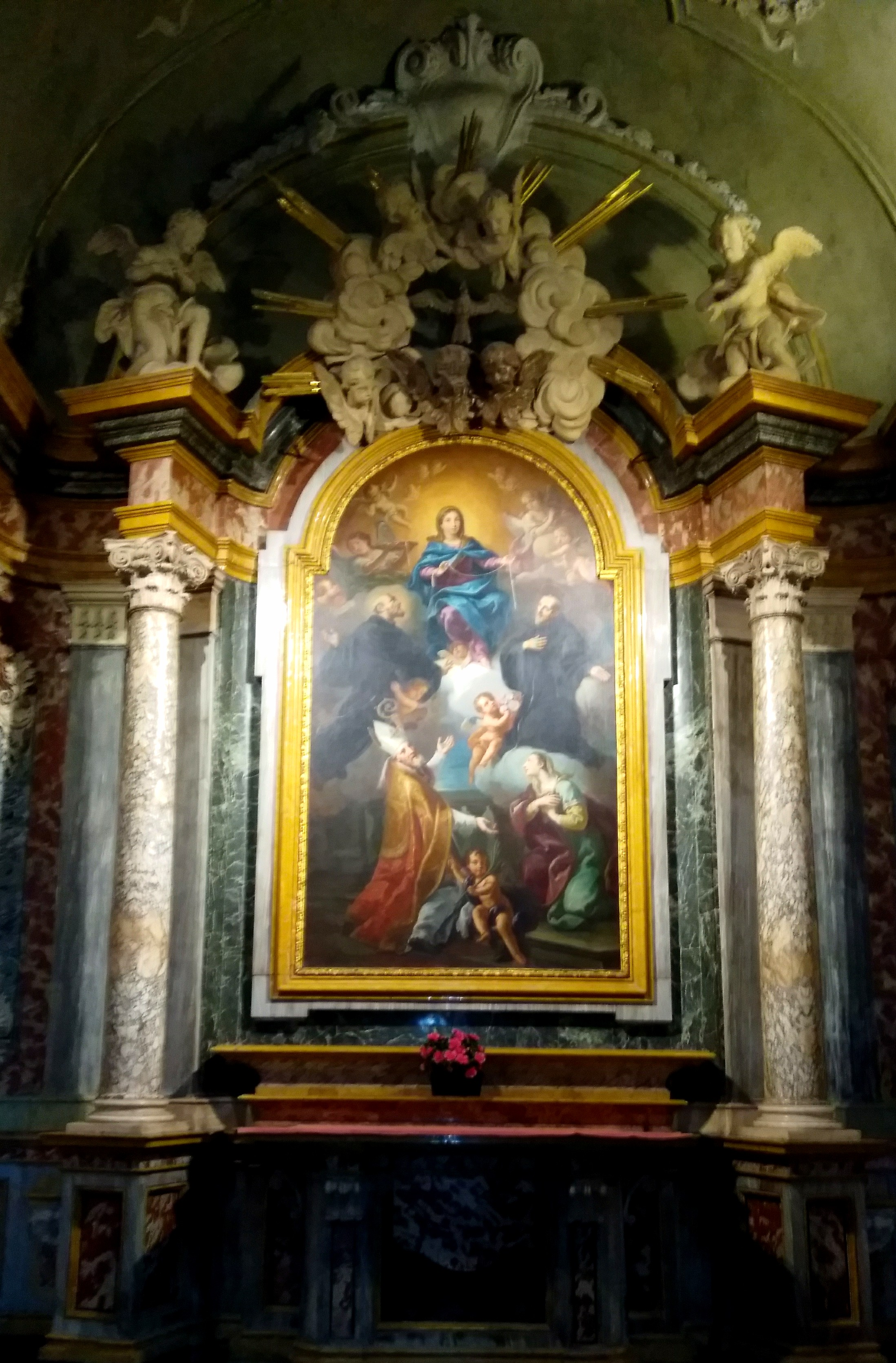 La pala dell'altare dei Santi Biagio e Liduvina - chiesa San Francesco Torino; Isabella Maria dal Pozzo (14 agosto 1666)